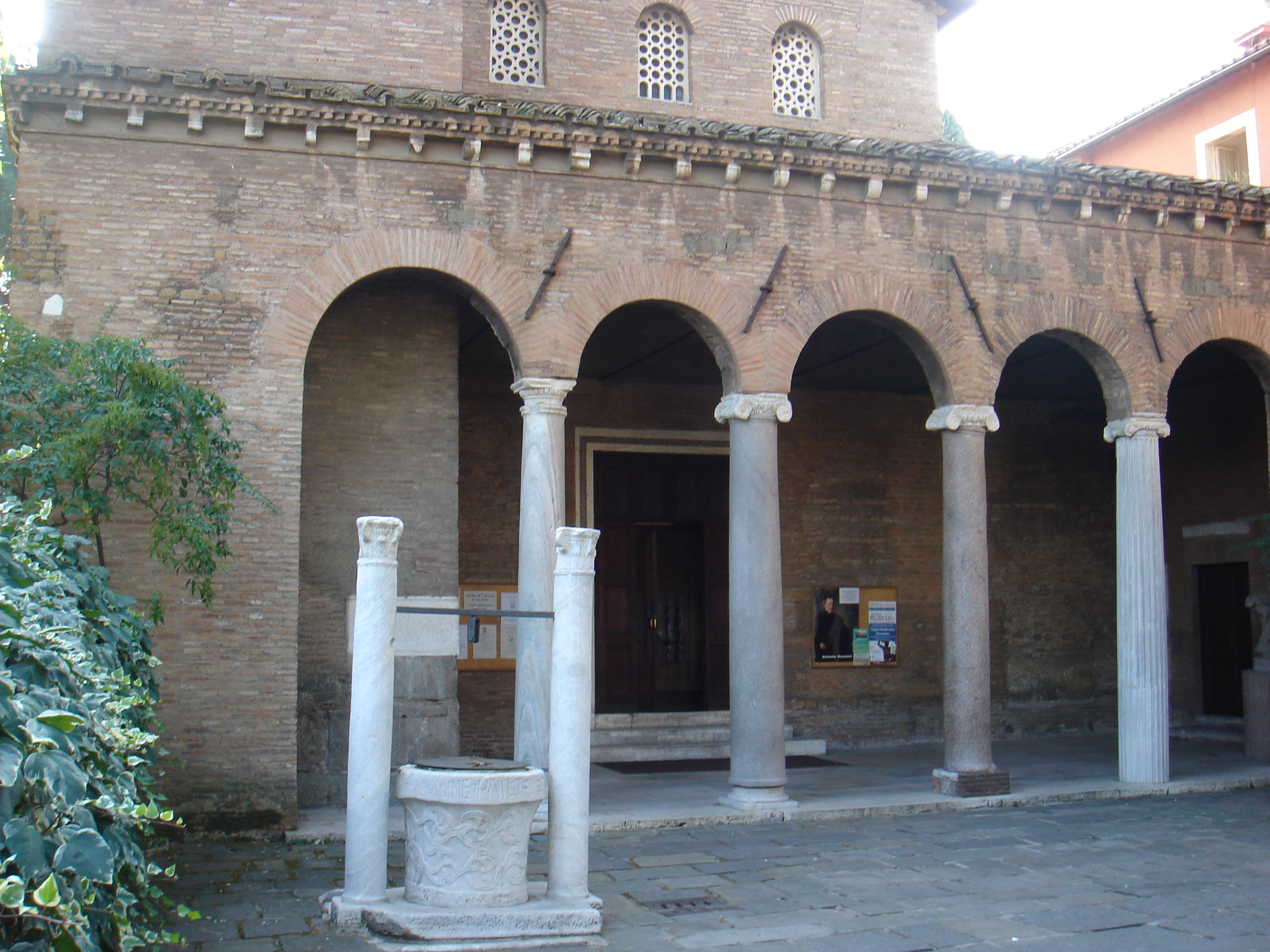 Roma, San Giovanni a Porta